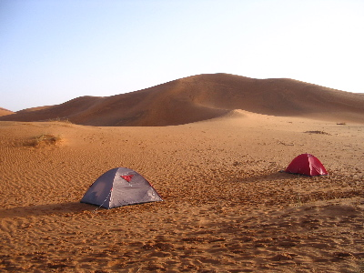 Tente dune Algérie